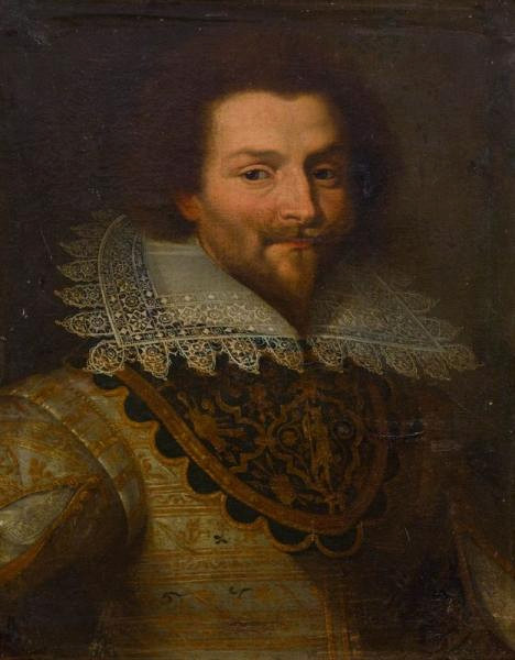 Portrait du duc de Luynes, futur connétable de France. Le tableau a été vendu par erreur sous l'identité du duc de Buckingham son contemporain. Localisation inconnue.